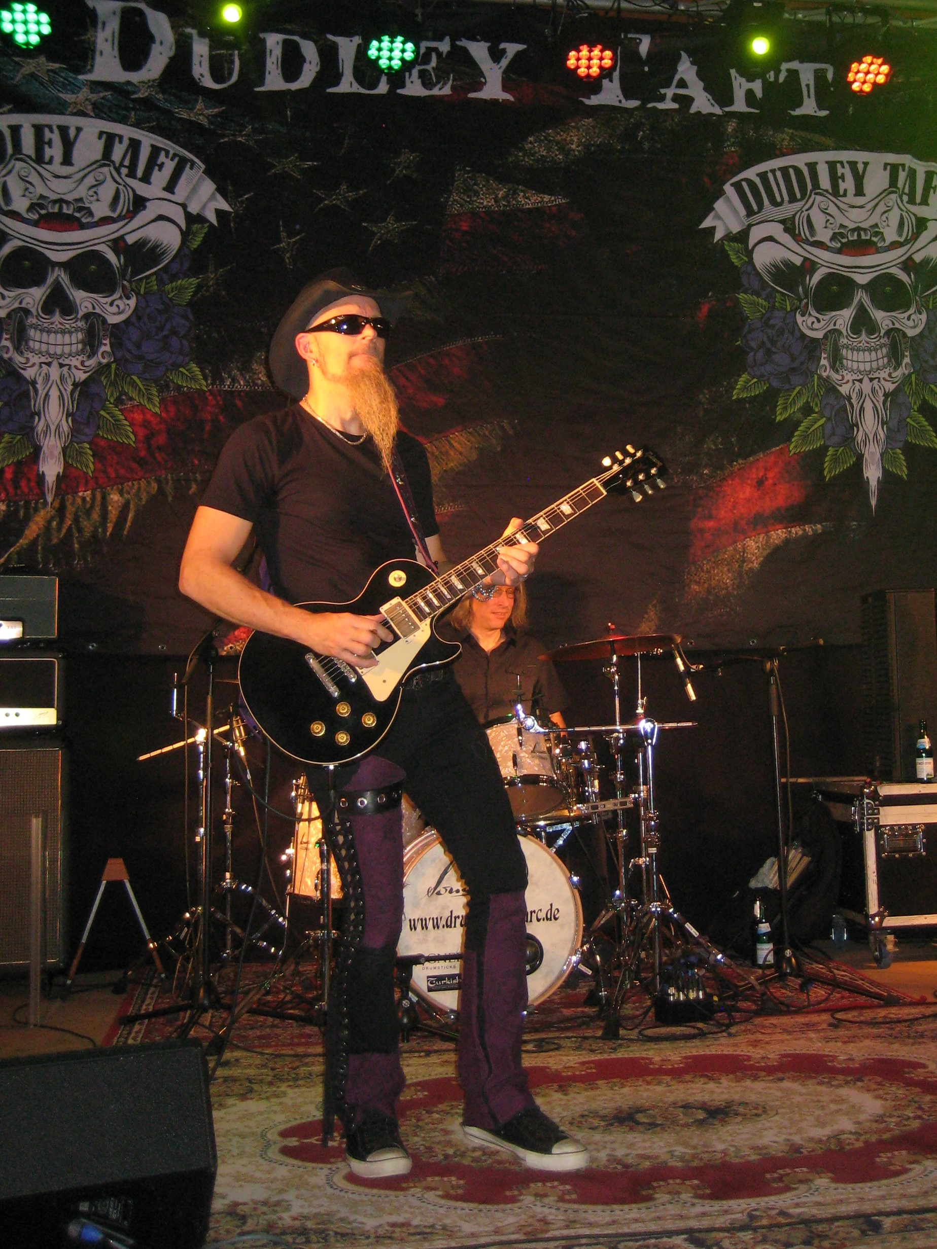 Bluesmusiker D. Tuft 2017 im Deutsch-Französischen Grenzgebiet